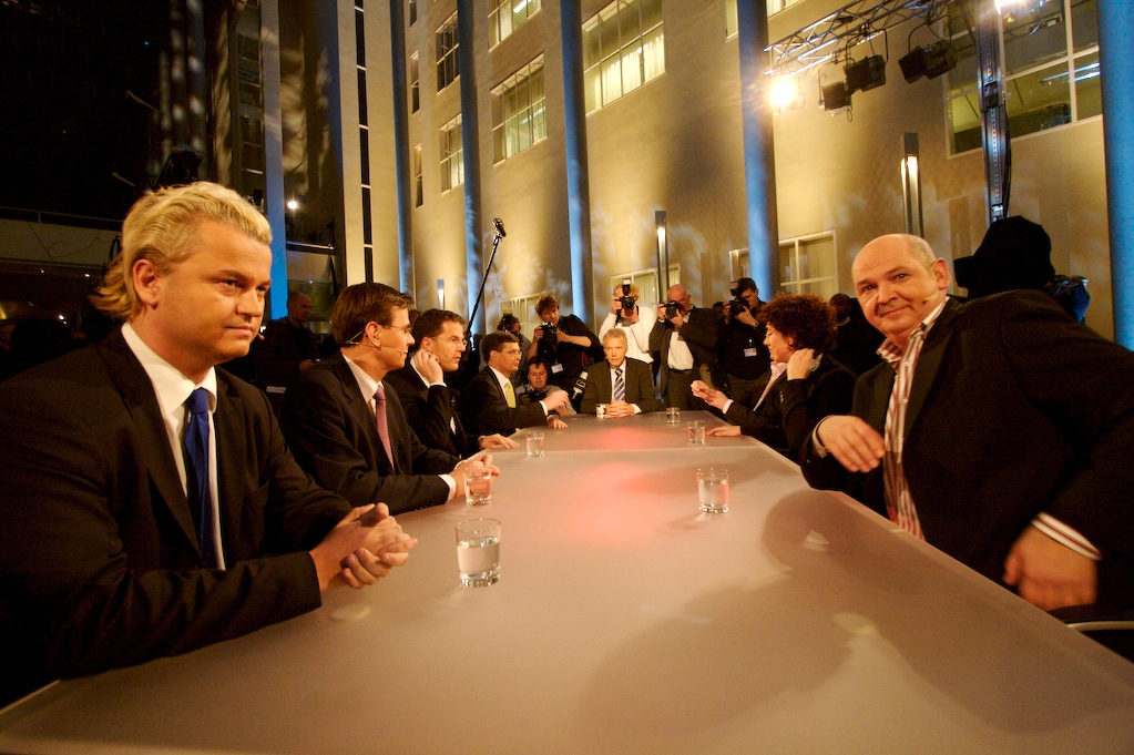 Alle lijsttrekkers nemen plaats aan tafel bij het slotdebat van de tweede kamer verkiezingen in 2006. Opdrachtgever: VVD